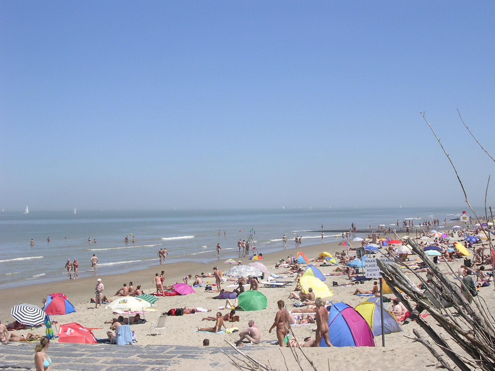 Bredene naturist beach